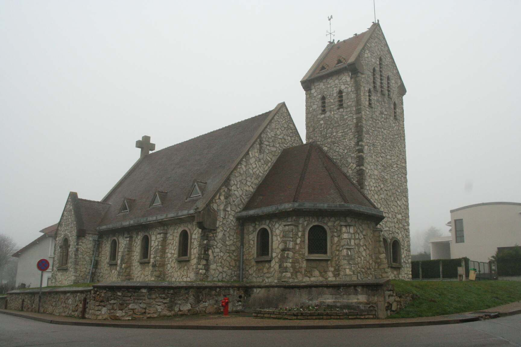 Église de Guitrancourt - Yvelines (France)